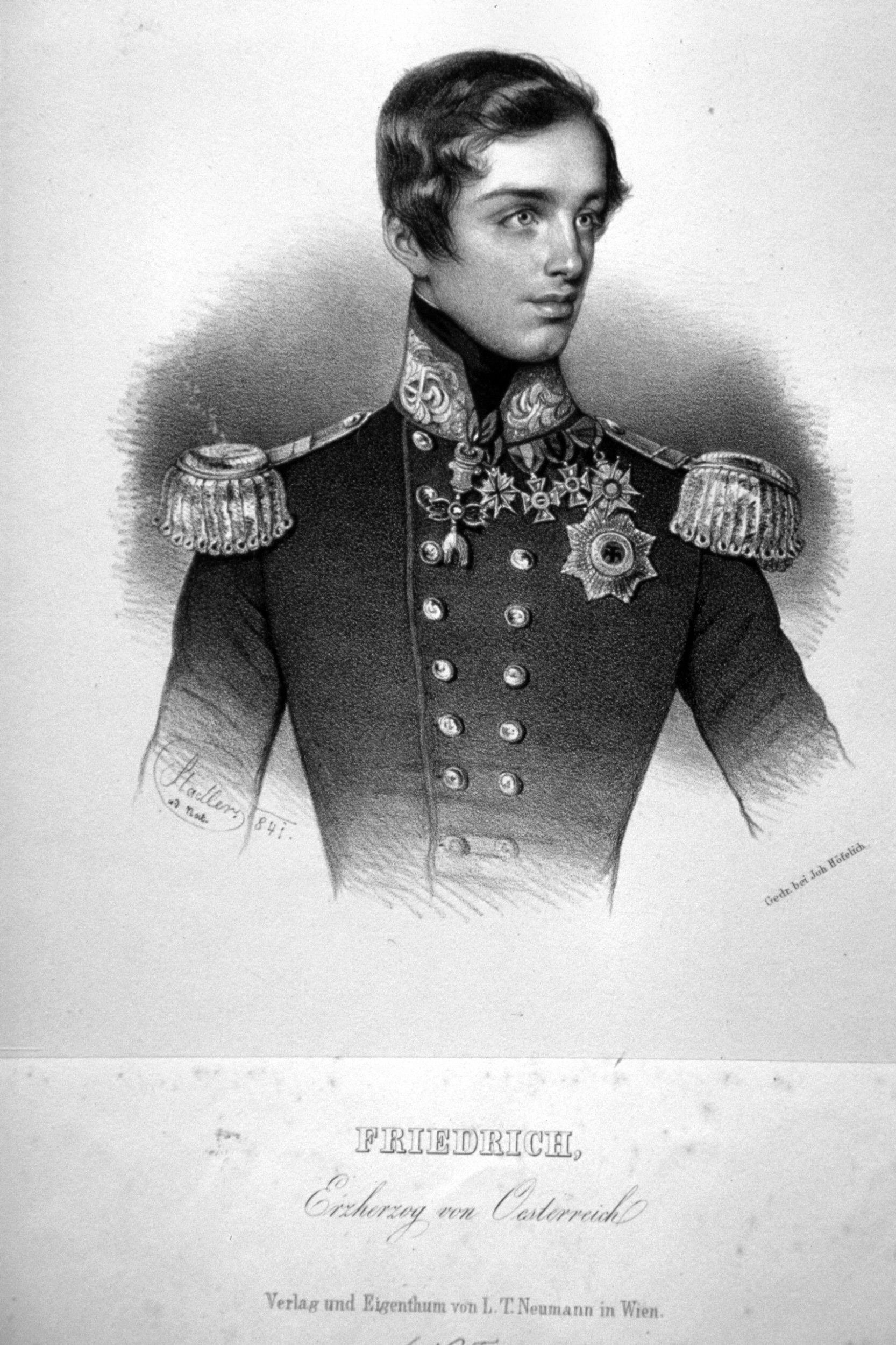 Erzherzog Friedrich Ferdinand Leopold von Österreich (1821-1847), Vizeadmiral, k. k. Marineoberkommandant.